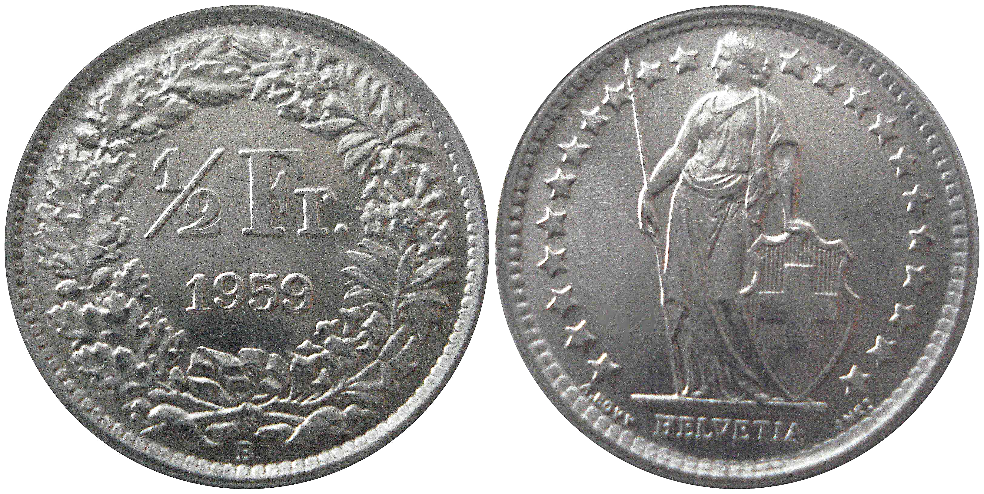 50 Centimes 1959, Argent (Ag 835), toute neuve...